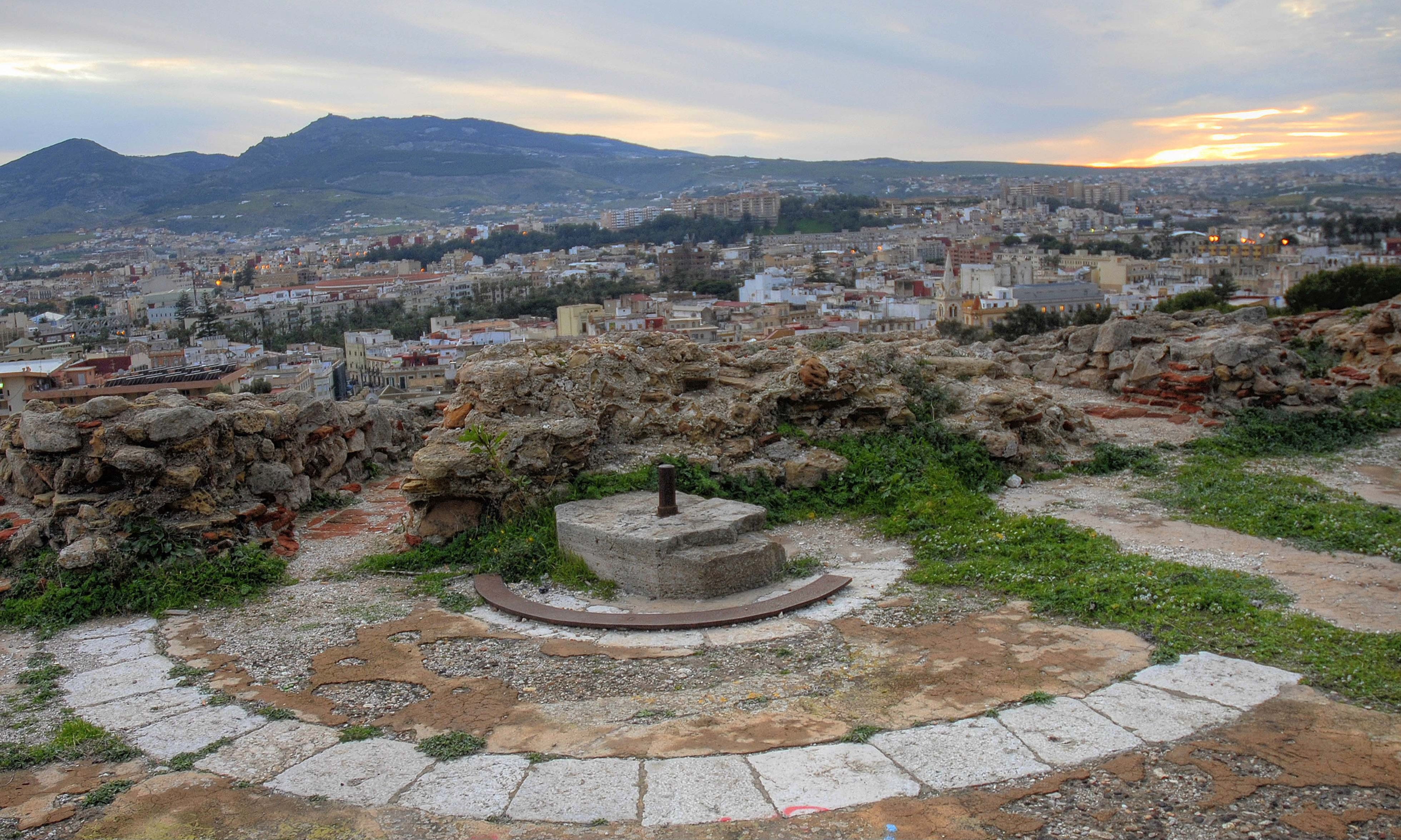 Raíles cañón